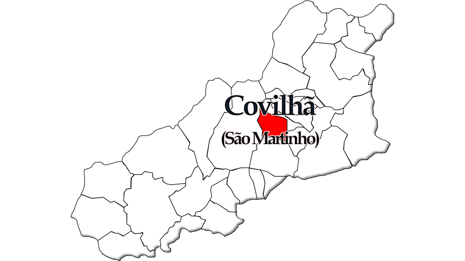 População